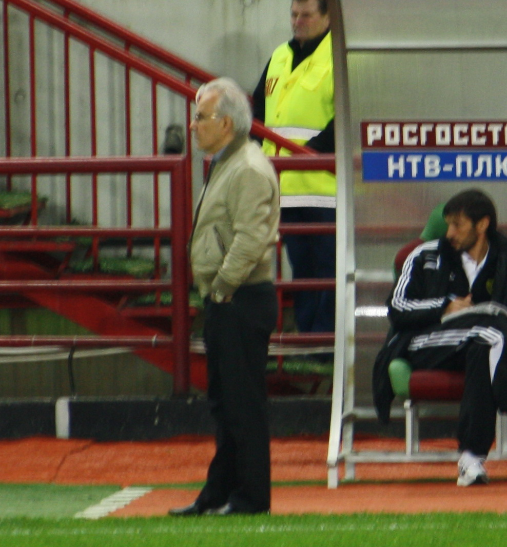 Gaji Gajiev